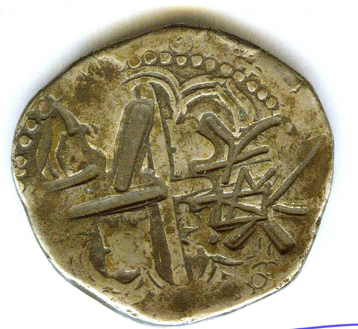 Moneda con resello que circuló en Macao